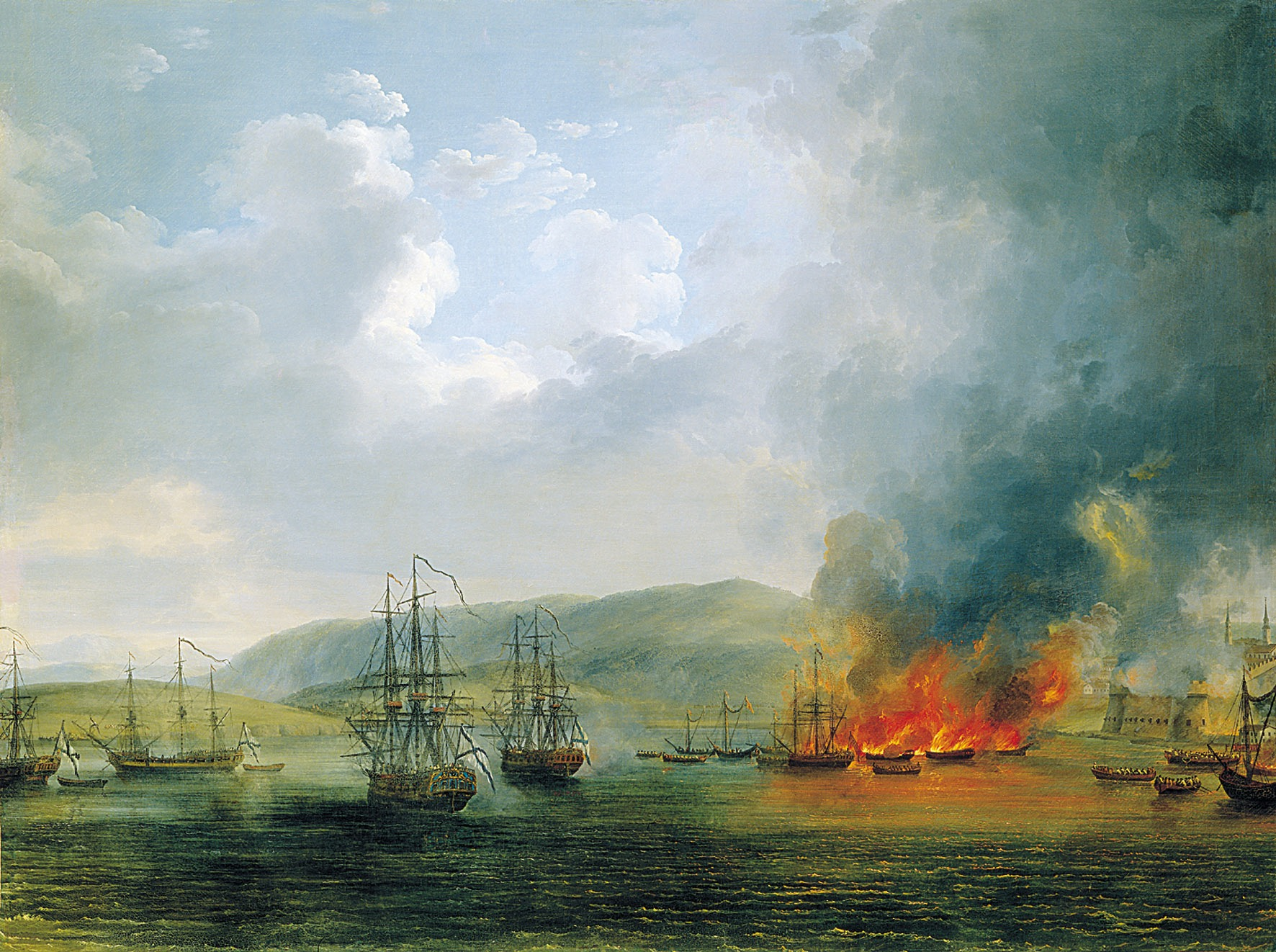 Это картина немецкого художника Якоба Филиппа Гаккерта «Второе сражение у бухты Чесма 24 октября 1772 года». Картина написана специально для Чесменского зала Большого Петергофского дворца в 1778 году. На картине описаны события Первой Архипелагской экспедиции русского флота — морского сражения у бухты Чесма 24 октября 1772 года. Описание картины. Слева — корабли отряда адмирала Грейга, справа — охваченные пламенем турецкие суда, около них — шлюпки с русскими матросами и пехотинцами. У края картины — берег Чесменской бухты с окутанными дымом крепостными стенами и башнями минаретов, около берега — лодки с войсками русского десанта.